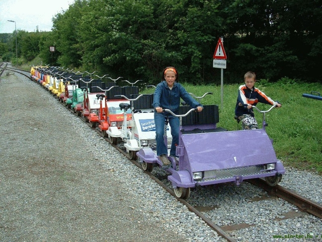 Bérelhető hajtányok Felsőpulyán (Oberpullendorf, Ausztria)